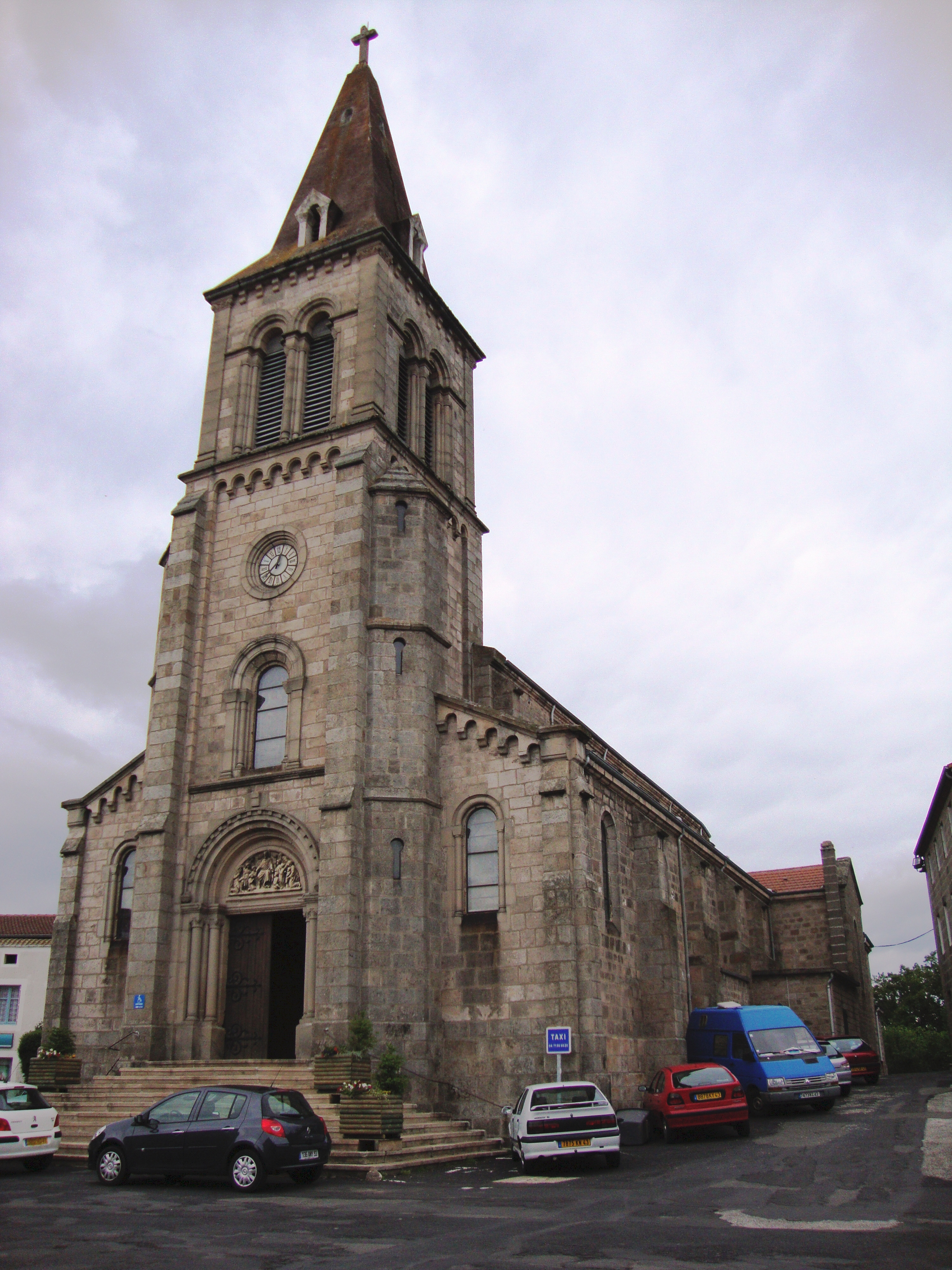 St.Pal-de-Mons (Haute-Loire, Fr) église, façade et tour.